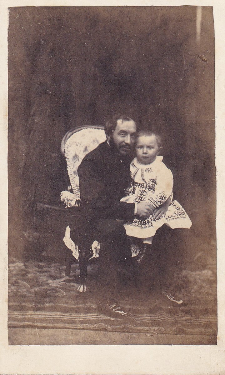 Ernest Jean-Louis Van Dievoet avec son fils Eugène